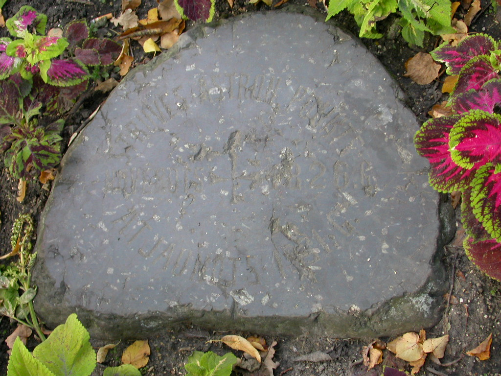 Strūves ģeodēziskais punkts Jēkapilī, Strūves parkā. (Ievas Upenieces foto)